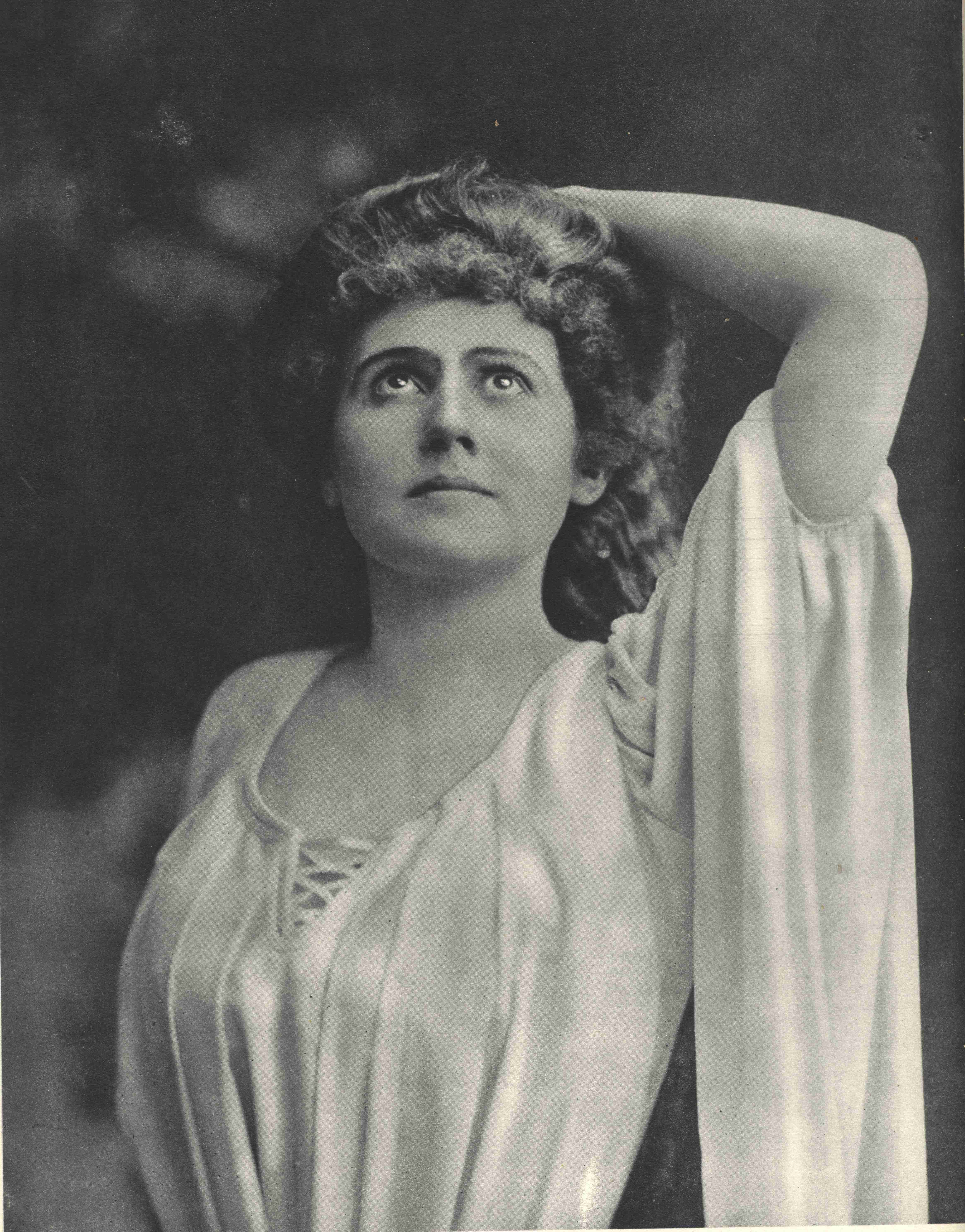 Description